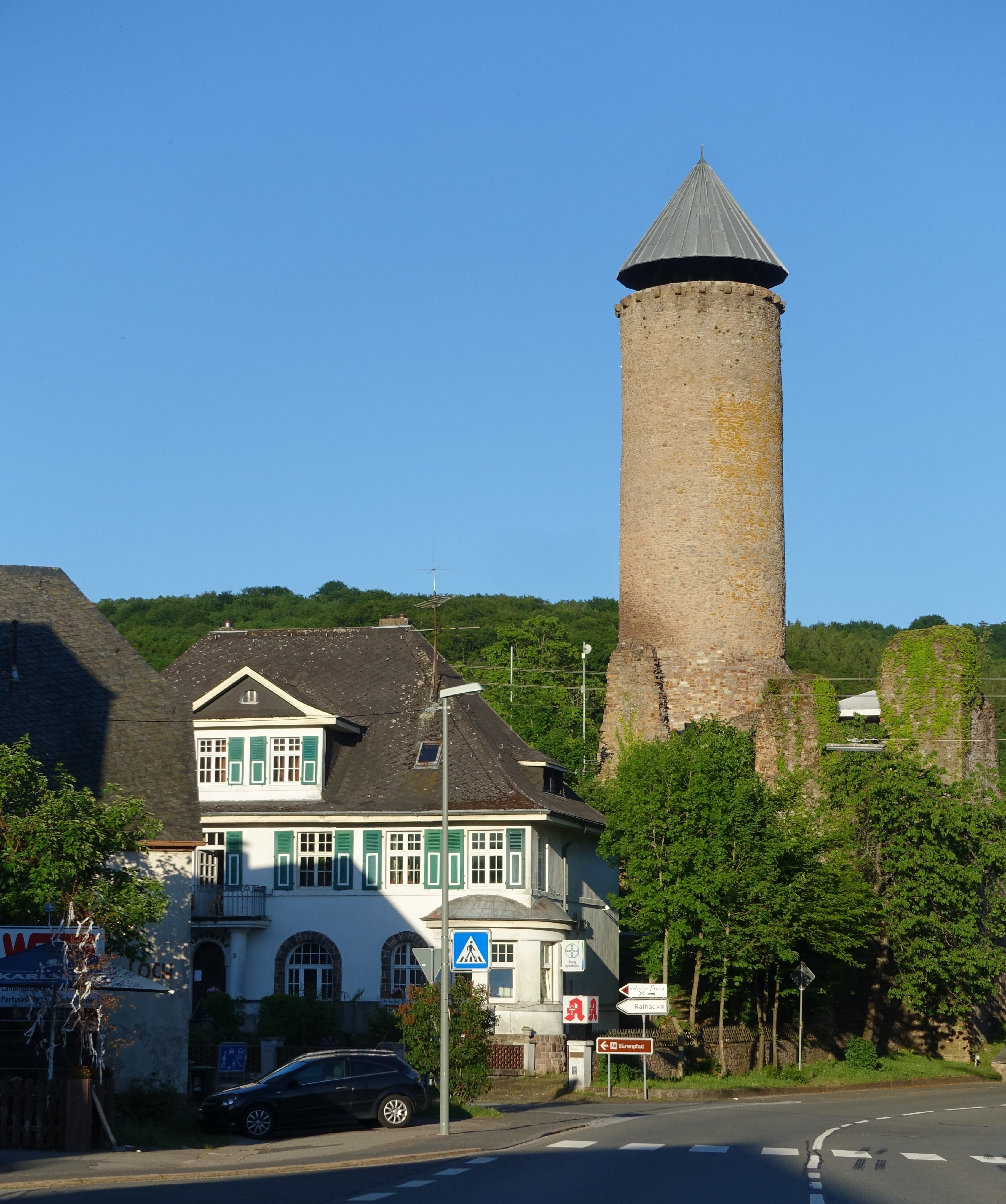 Nohfelden - Bergfried aus 1285, Wahrzeichen der Stadt